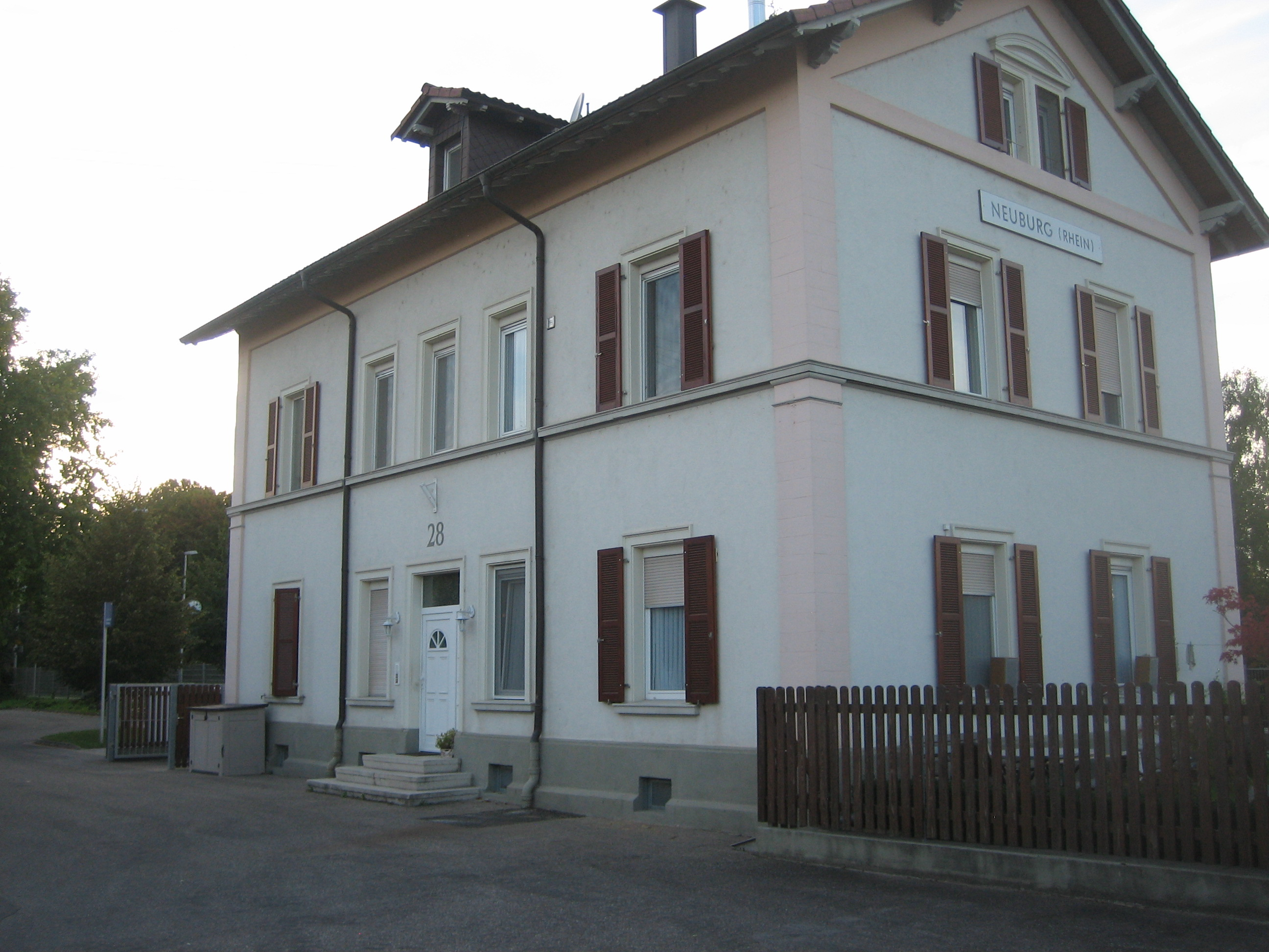 Bezeichnung: Bahnhof Neuburg (Rhein) 2014 Lage: Bahnhofstraße 28 Ort: Neubur am Rhein, Landkreis Germersheim, Rheinland-Pfalz Bauzeit: um 1860/70 Beschreibung: spätklassizistischer Typenbau